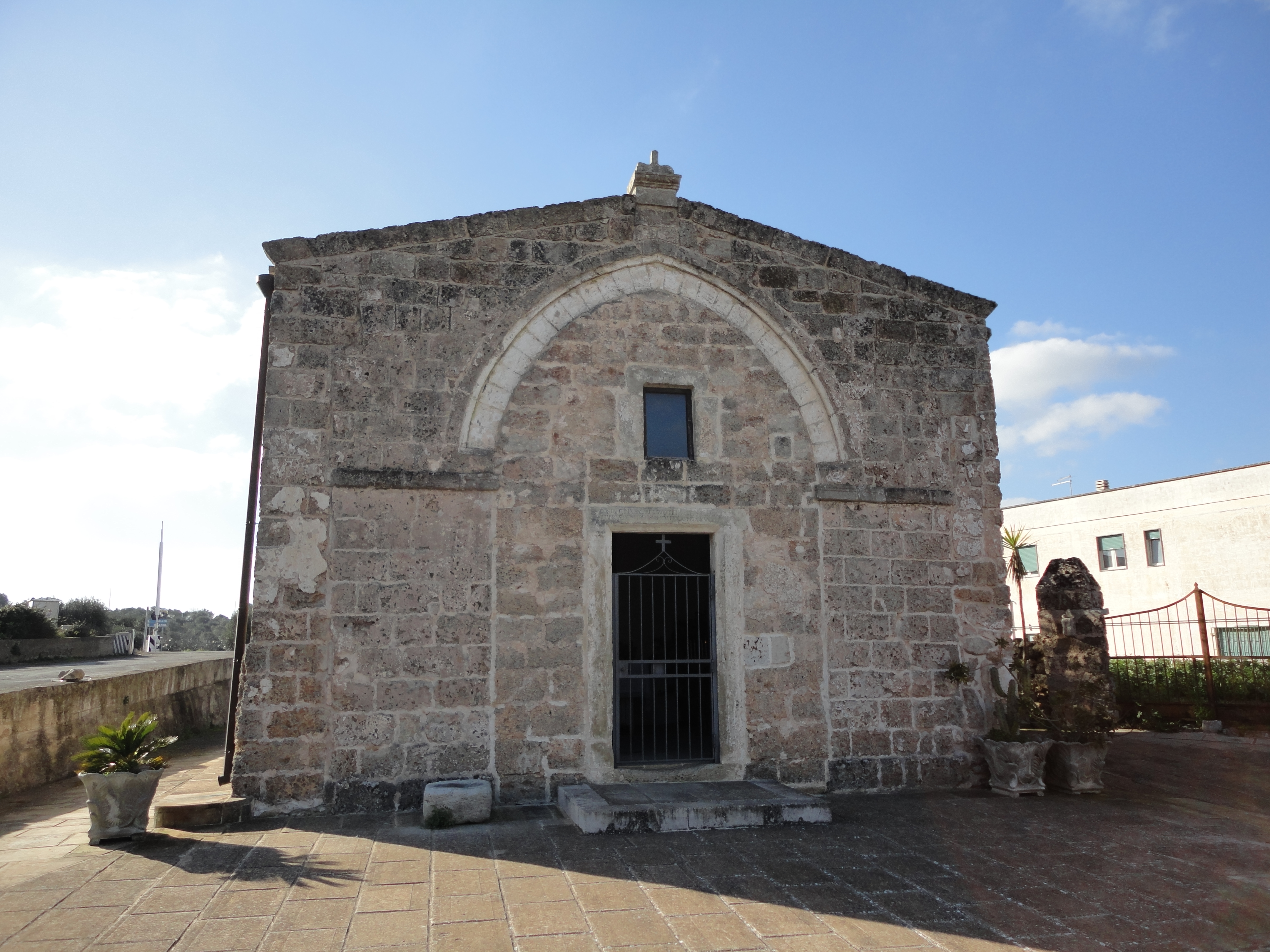 Cappella di San Vito Sternatia, Lecce